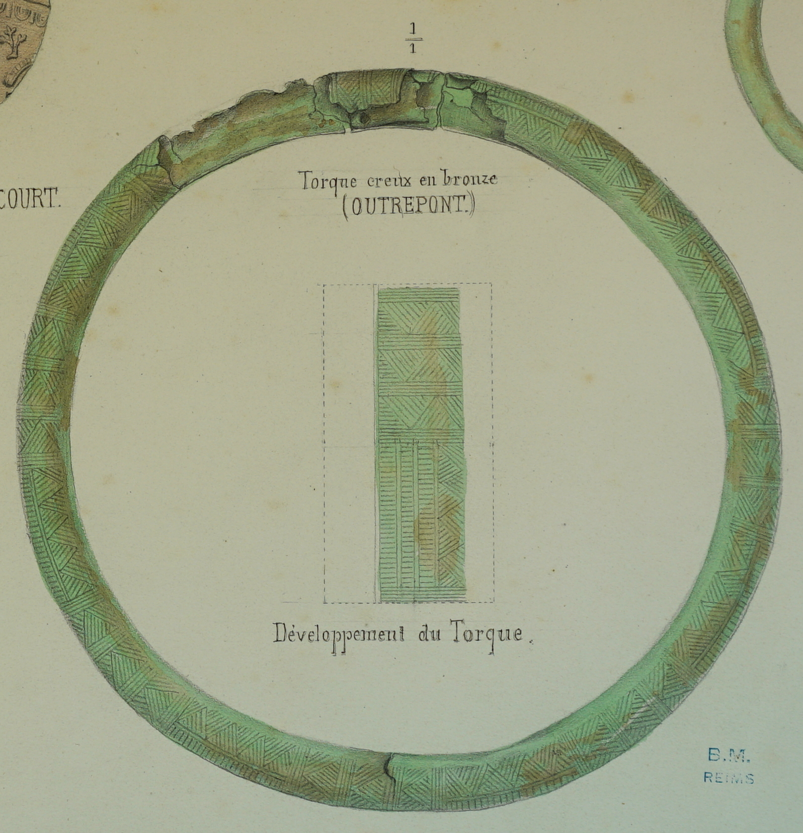 relevé des fouilles de Morel.